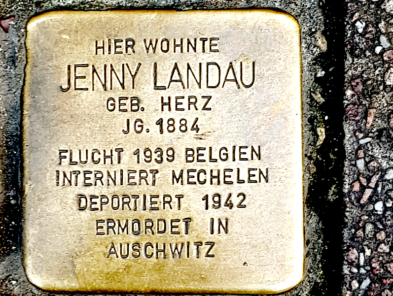 Stolperstein für Jenny Landau, geb. Herz, Jg. 1884, geflüchtet nach Belgien 1939, interniert in Machelen, deportiert 1942, ermordet im Vernichtungslager Auschwitz